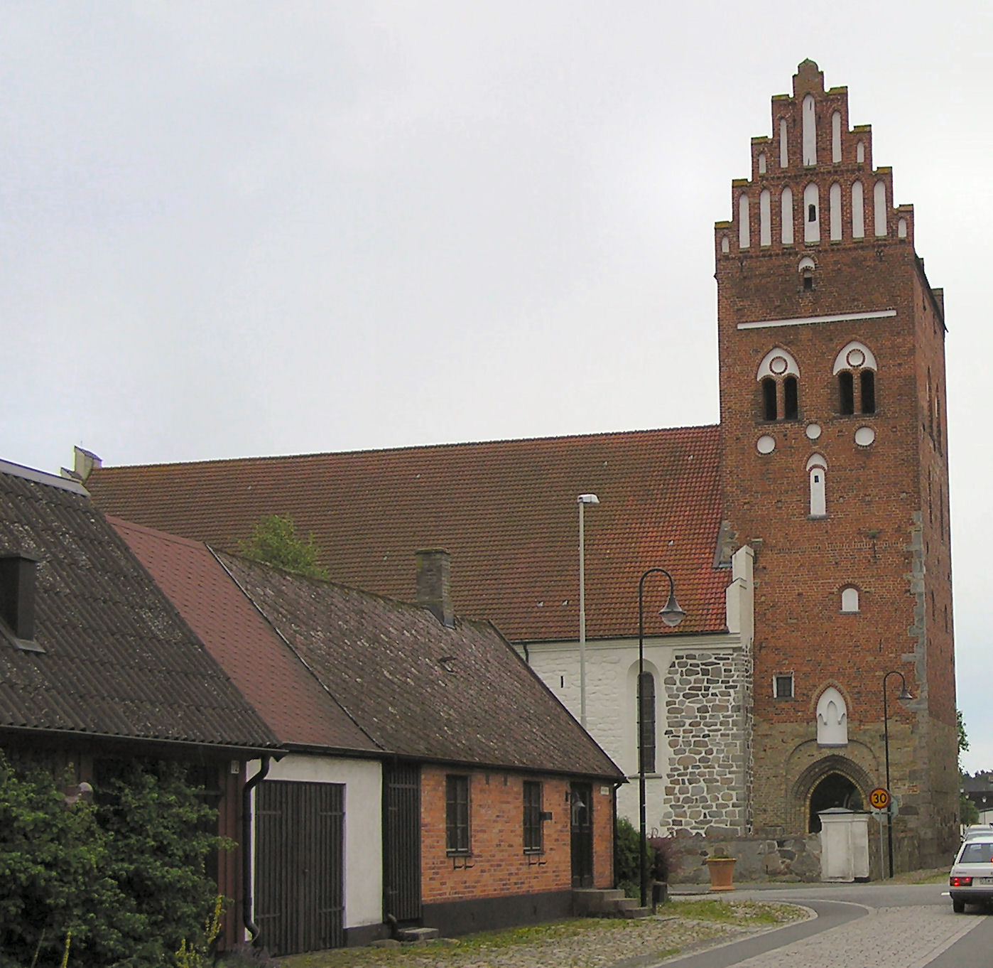 Åhus Mariakirke, ydre